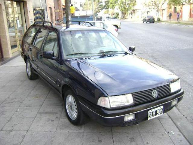 Fotografía de un Volkswagen Quantum.